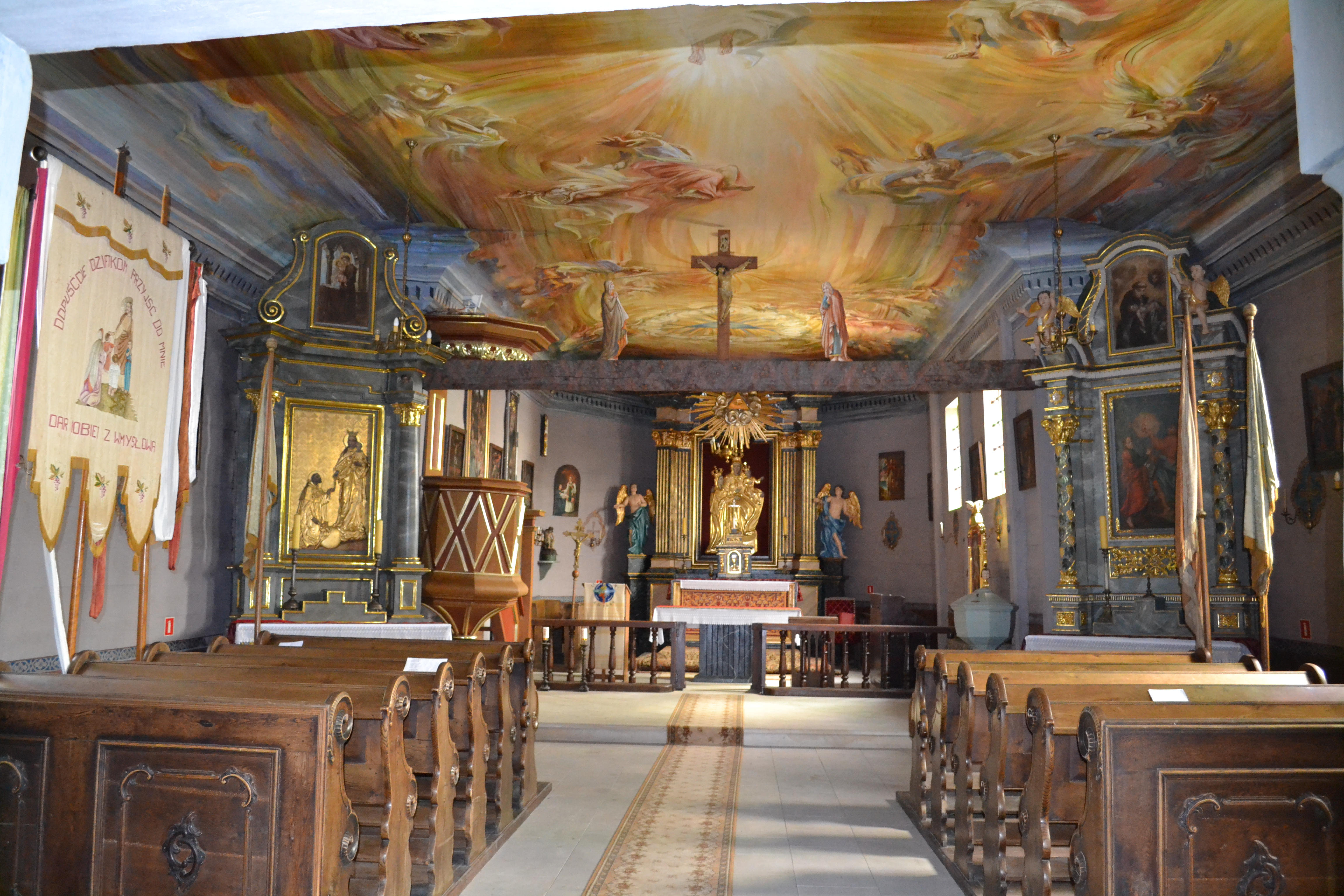 Annopol, kosciół drewniany